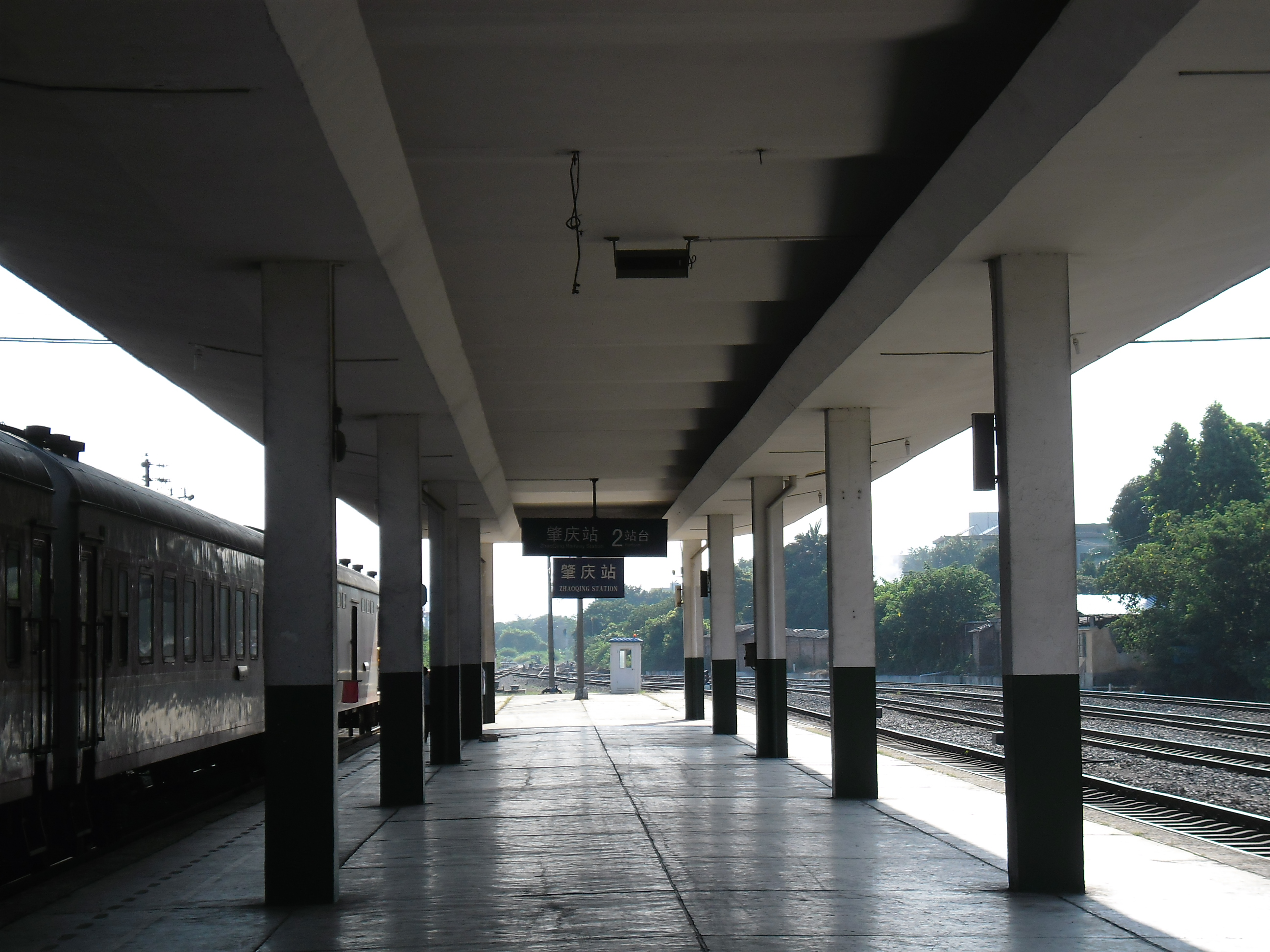 中文（中国大陆）: 2011年的肇庆站2站台